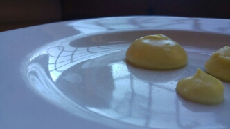 Espuma de aceite en metodo graso